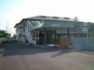 近鉄ja:南が丘駅